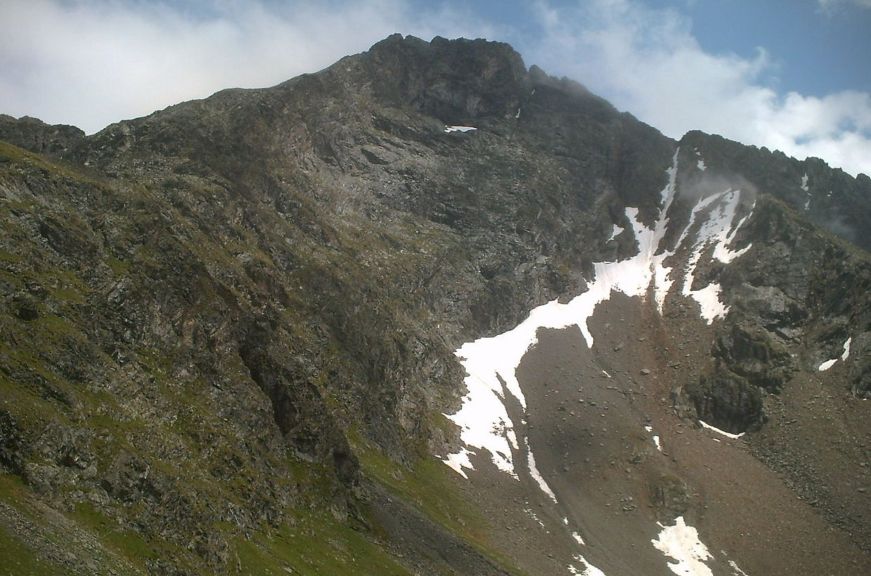 Hundstalkogel vom Moalandlsee